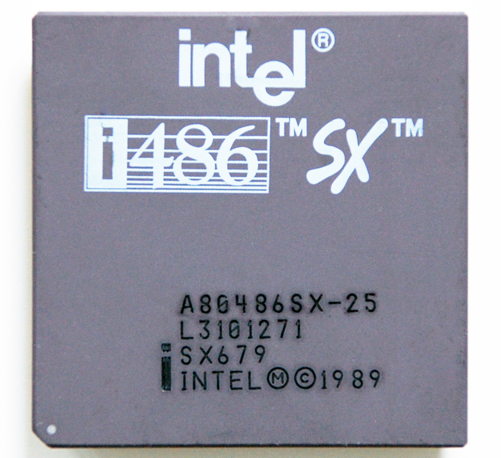 Intel i486 SX-25